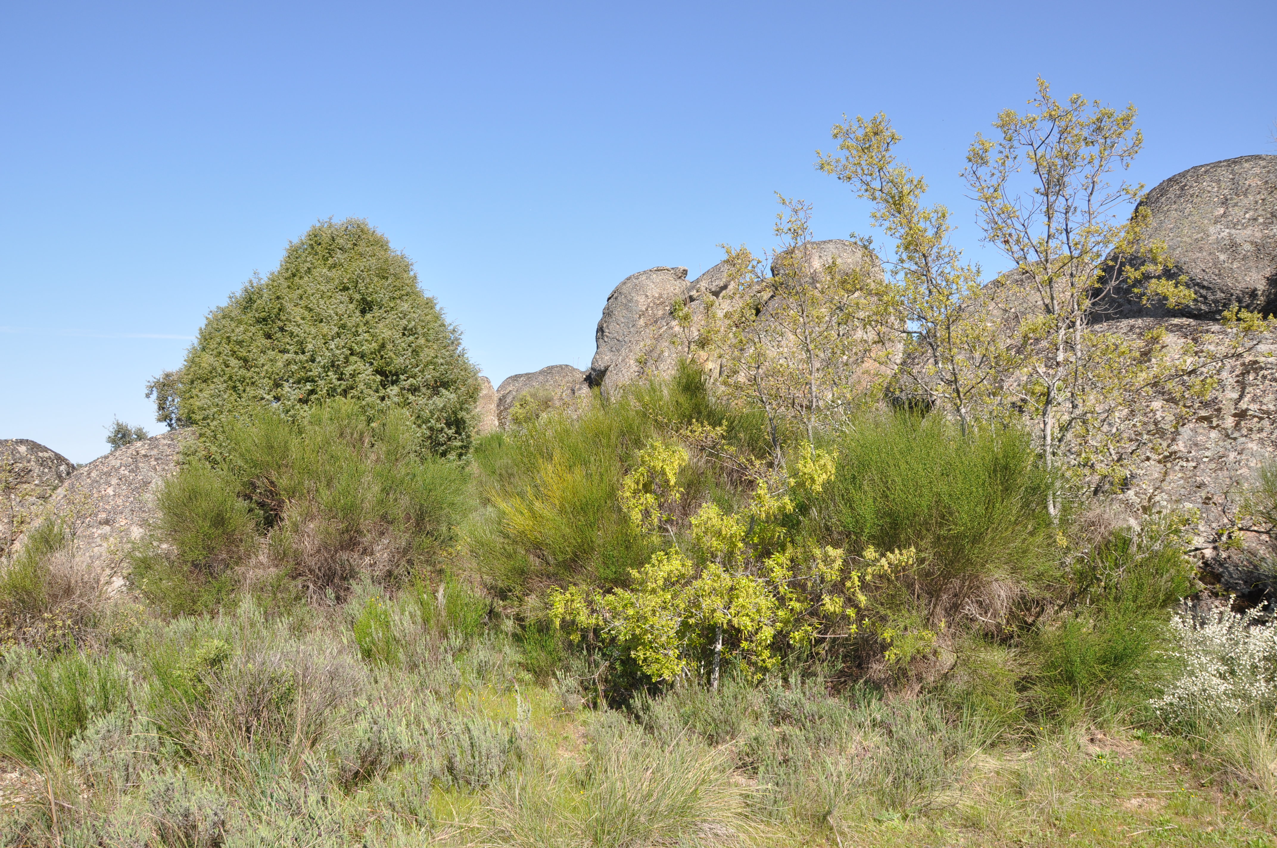 Zimbro (Juniperus oxycedrus) e cerquinhos (Quercus faginea). Miranda do Douro, Portugal.